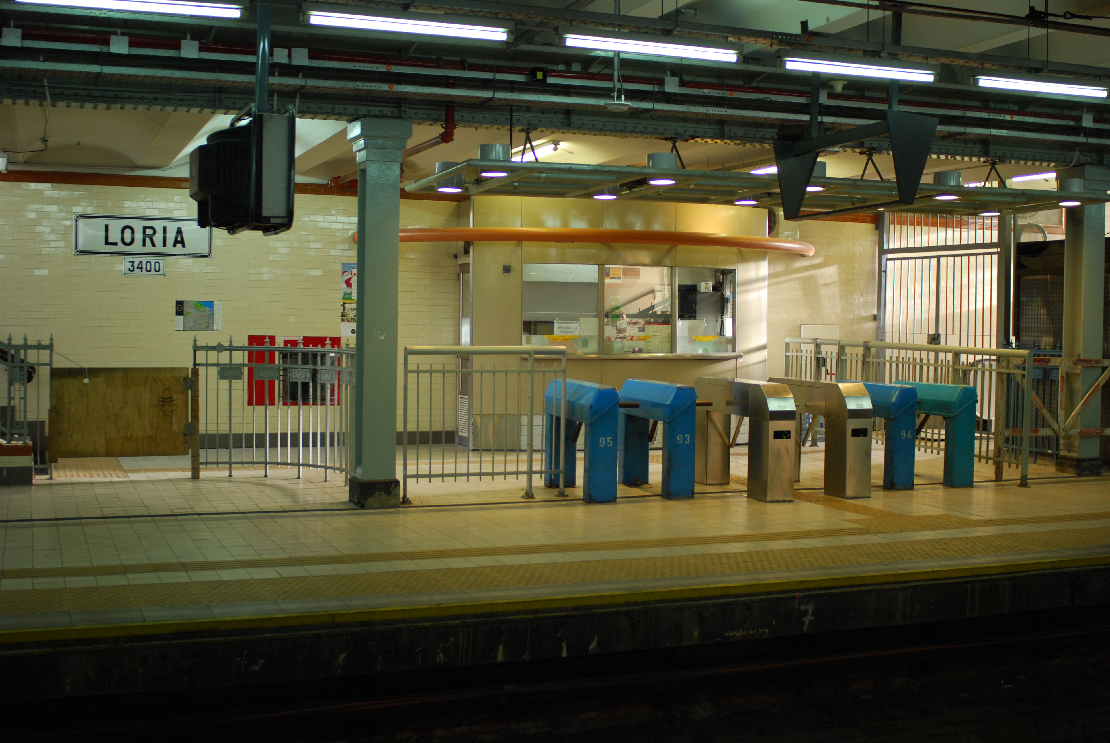 boletería y andén de trenes hacia Primera Junta en la estación Loria de la línea A de subtes en Buenos Aires, Argentina (diciembre 2008)